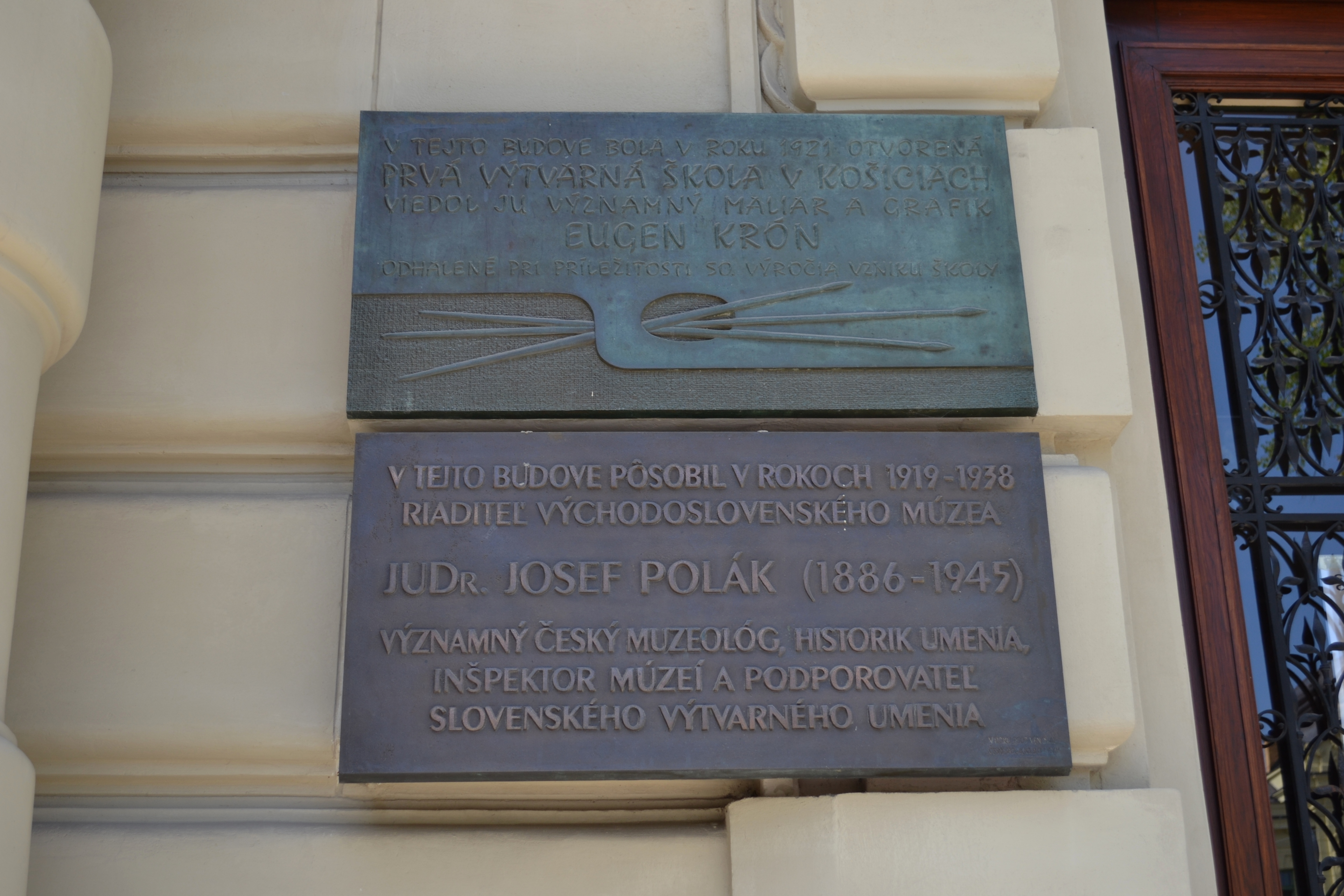 Pamätné tabule pri vchode do Východoslovenského múzea, 1., v roku 1921 bola v tejto budove otvorená prvá výtvarná škola v Košiciach, ktorú viedol významný grafik a maliar Eugen Krón (kultúrna pamiatka), 2., v rokoch 1919 až 1938 tu pôsobil Josef Polák, významný český židovský muzeológ a historik umenia, inšpektor múzeí na Slovensku a v Podkarpatskej Rusi.